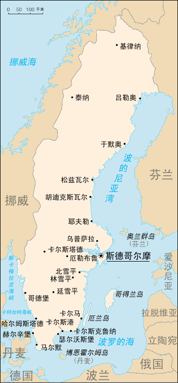 瑞典地图。